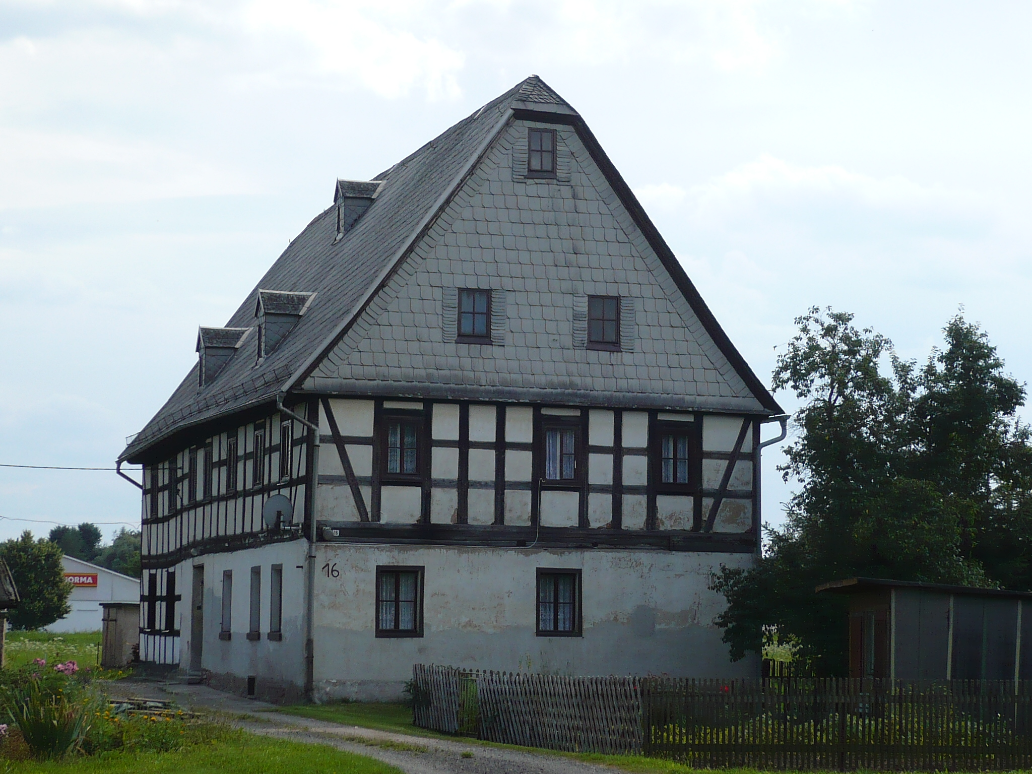 Wohnhaus, Brückenstraße 16 in Neukirchen/Pleiße